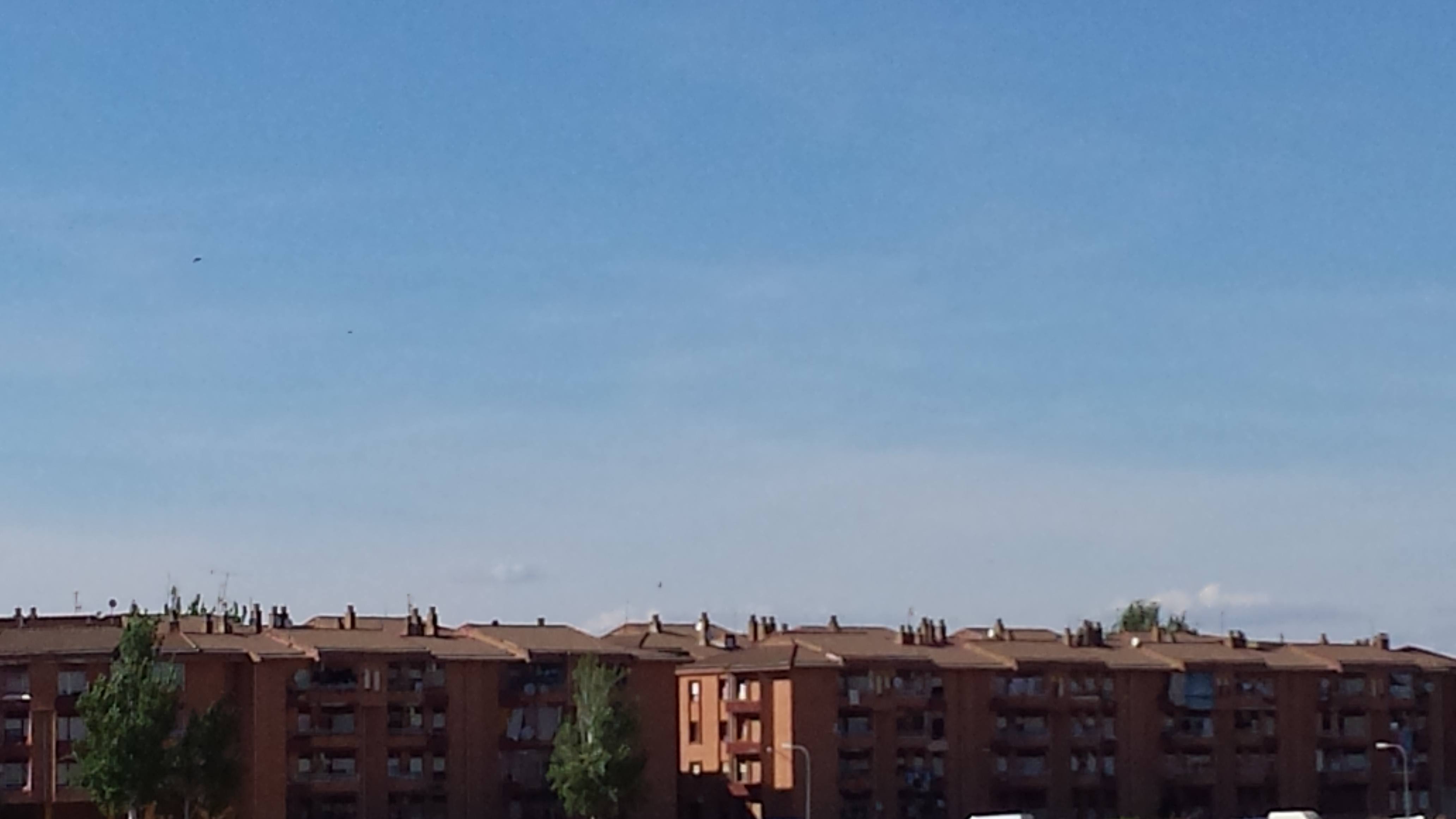 La Milagrosa (Las 600). Albacete